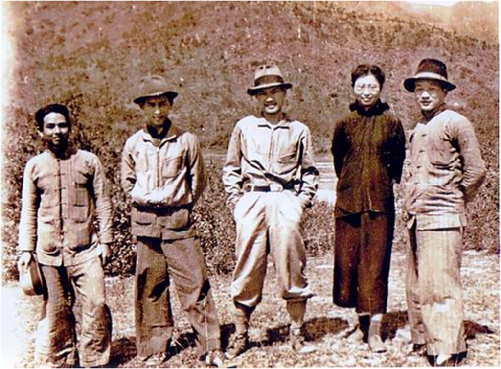 中文（中国大陆）: 刘黑仔存世唯一一张照片。